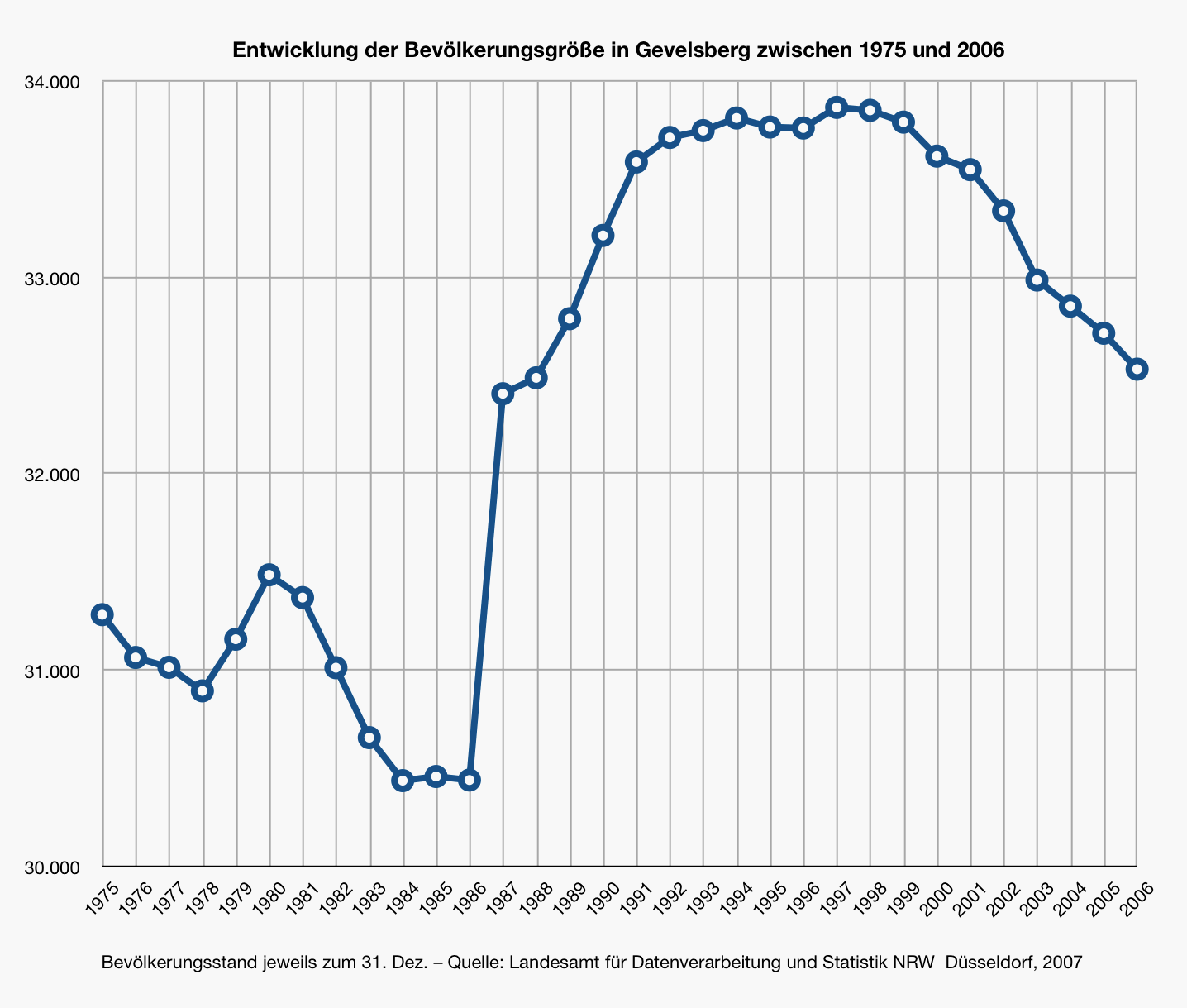 Entwicklung der Größe der Wohnbevölkerung in Gevelsberg zwischen 1975 und 2006